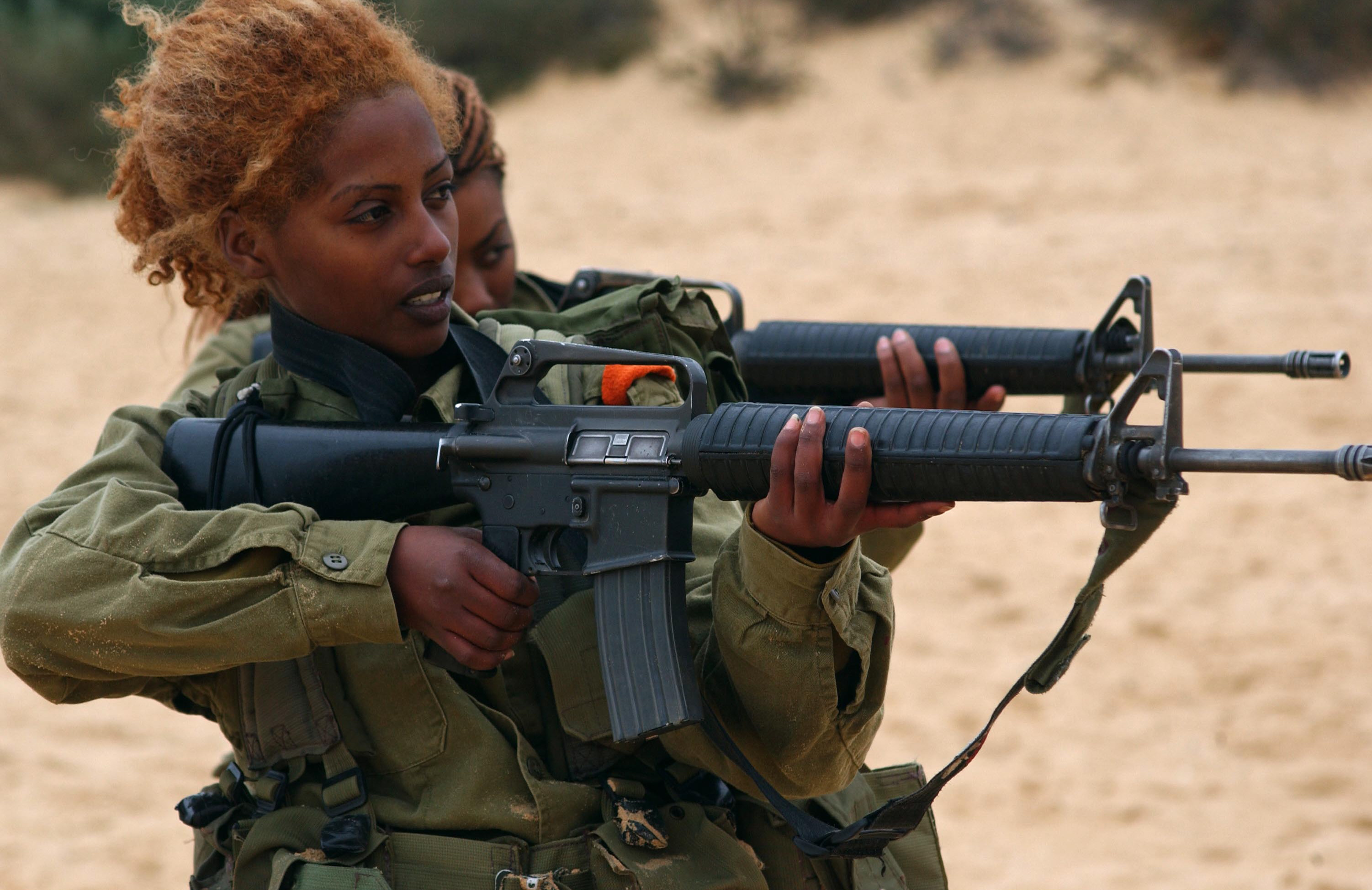 December 26, 2006. The Unit Commander's Course includes a field training week where the soldiers train and sleep in the field. קורסים פיקודיים כוללים שבוע אימונים בו החיילות מתאמנות וישנות בשטח.